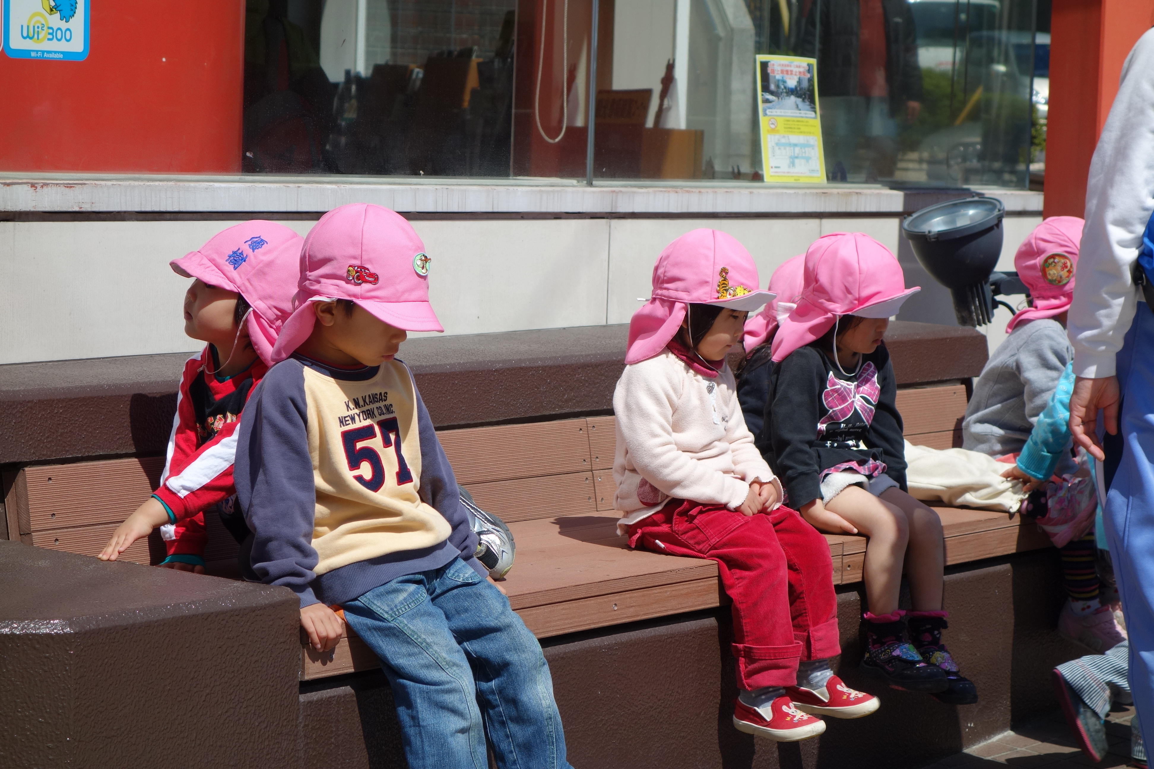 奈良